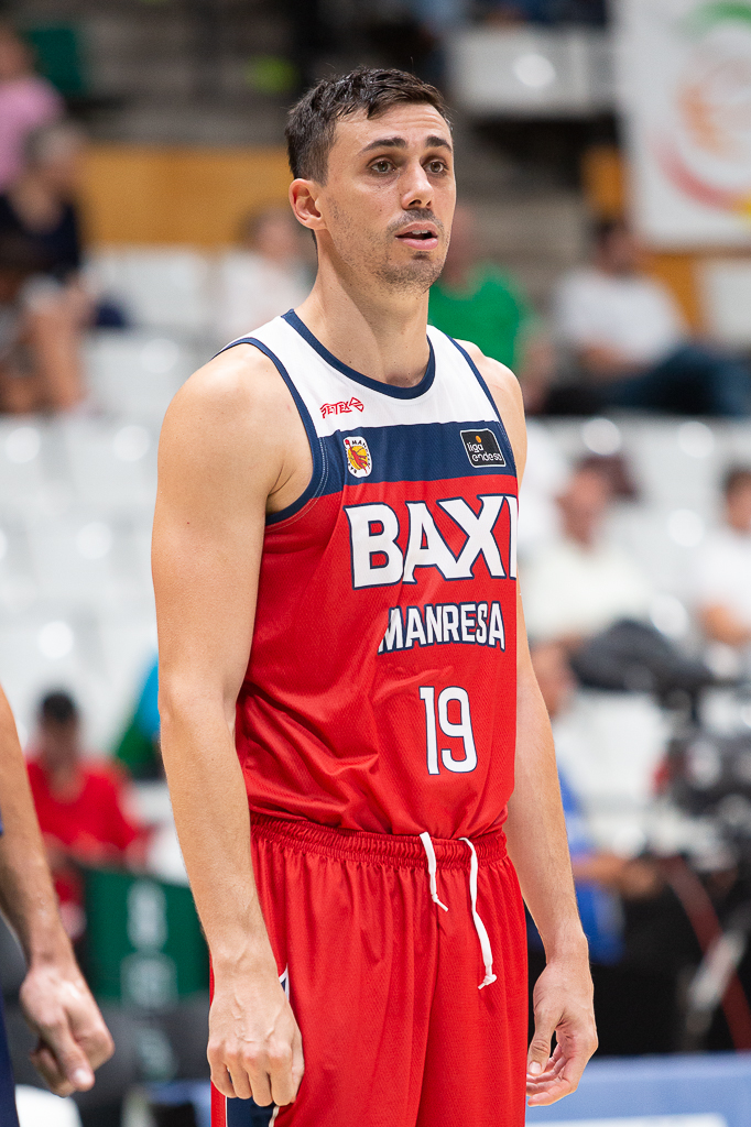 Pere Tomàs en un partido de la Liga Catalana 2019 en el Olímpico de Badalona.